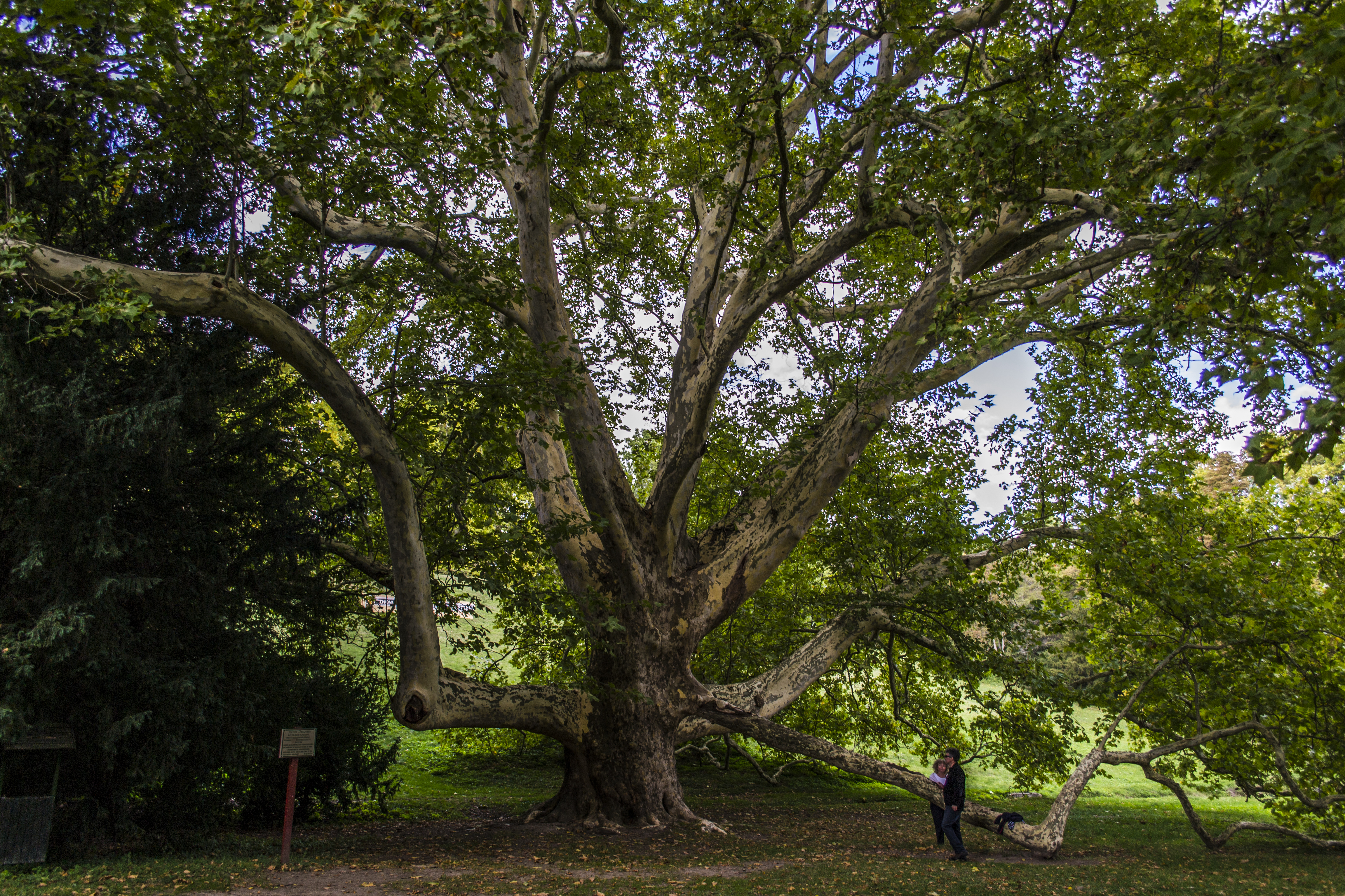 Károlyi-kastélyegyüttes és parkja, Füzérradvány – Idős platánfa a kastélyparkban This is a photo of a monument in Hungary. Identifier: 2768